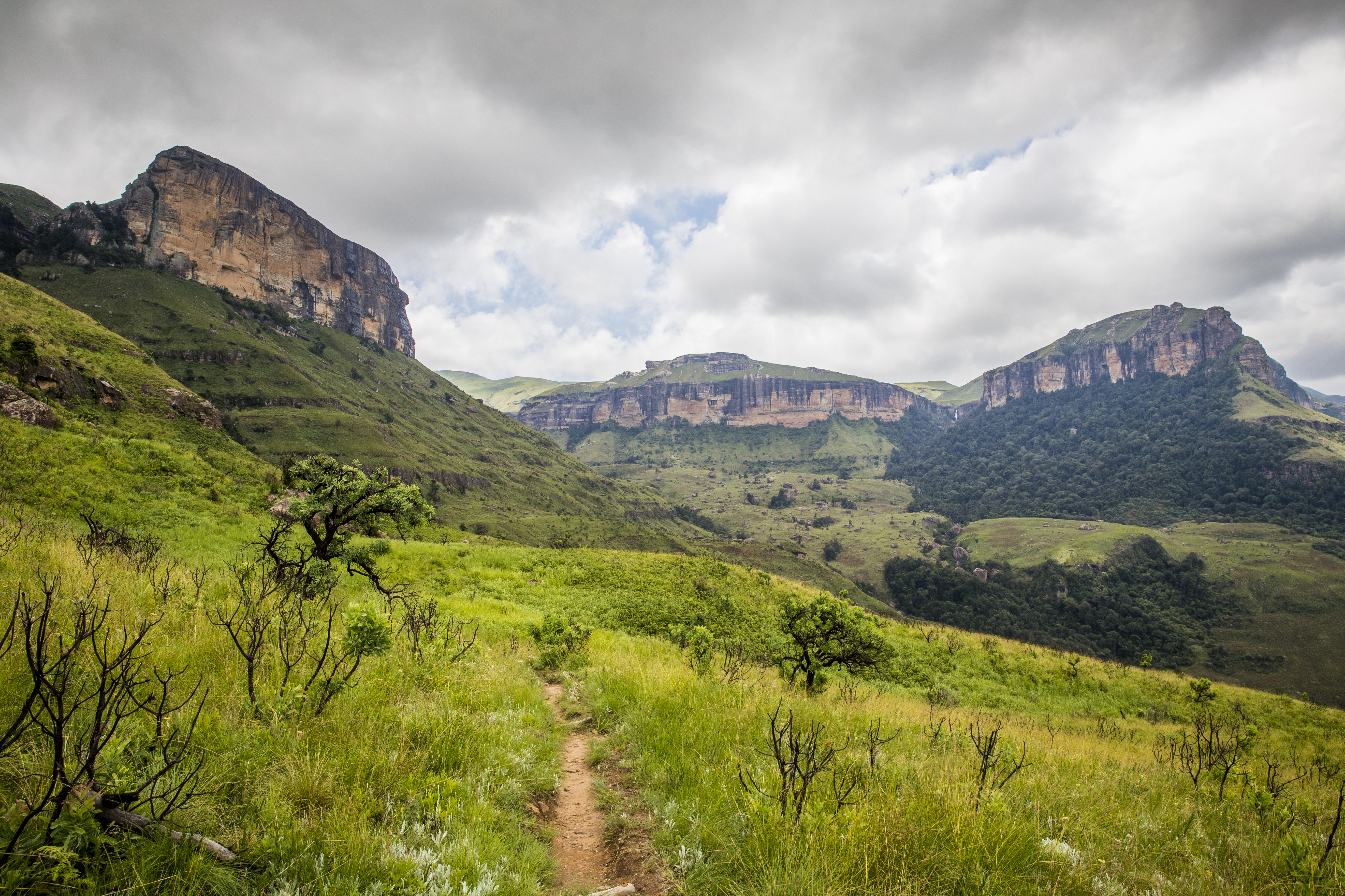 Photos at Royal Natal National Park